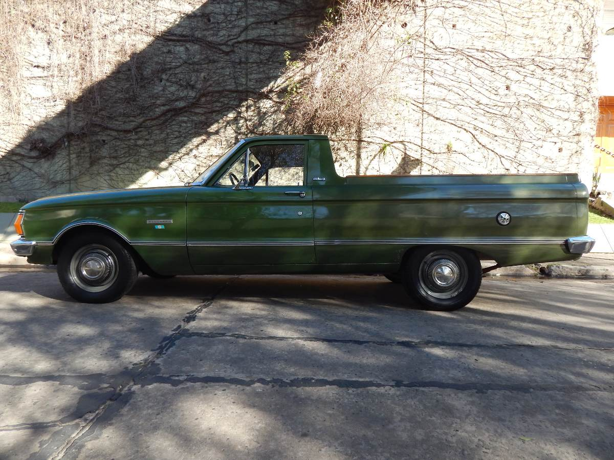 Ford Falcon Ranchero, производившийся в Аргентине с 1973 по 1991 годы. Данная модель Ford Falcon Ranchero Deluxe относится к серии автомобилей, производившихся с 1973 по 1977 гг.